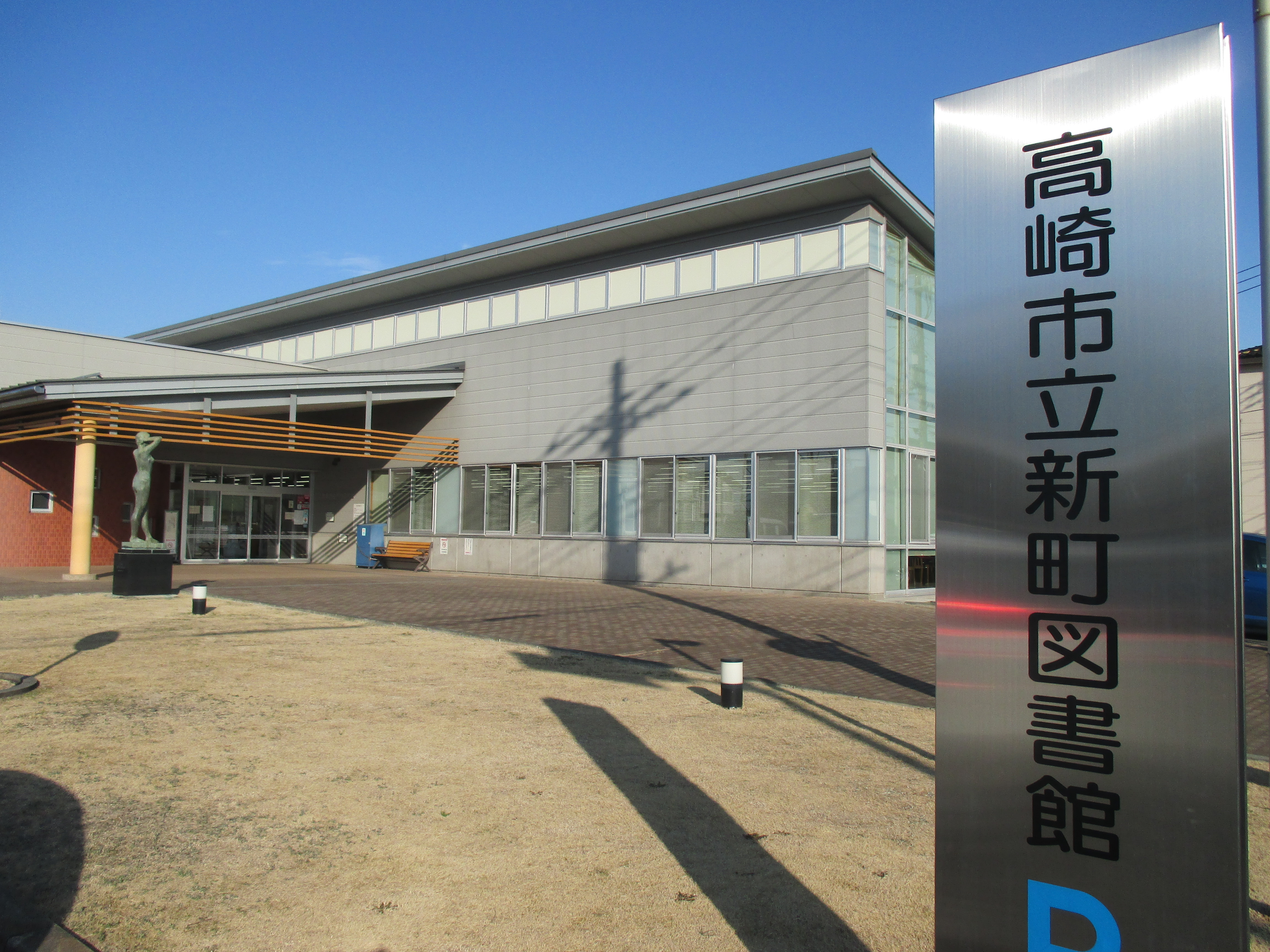 新町図書館の外観